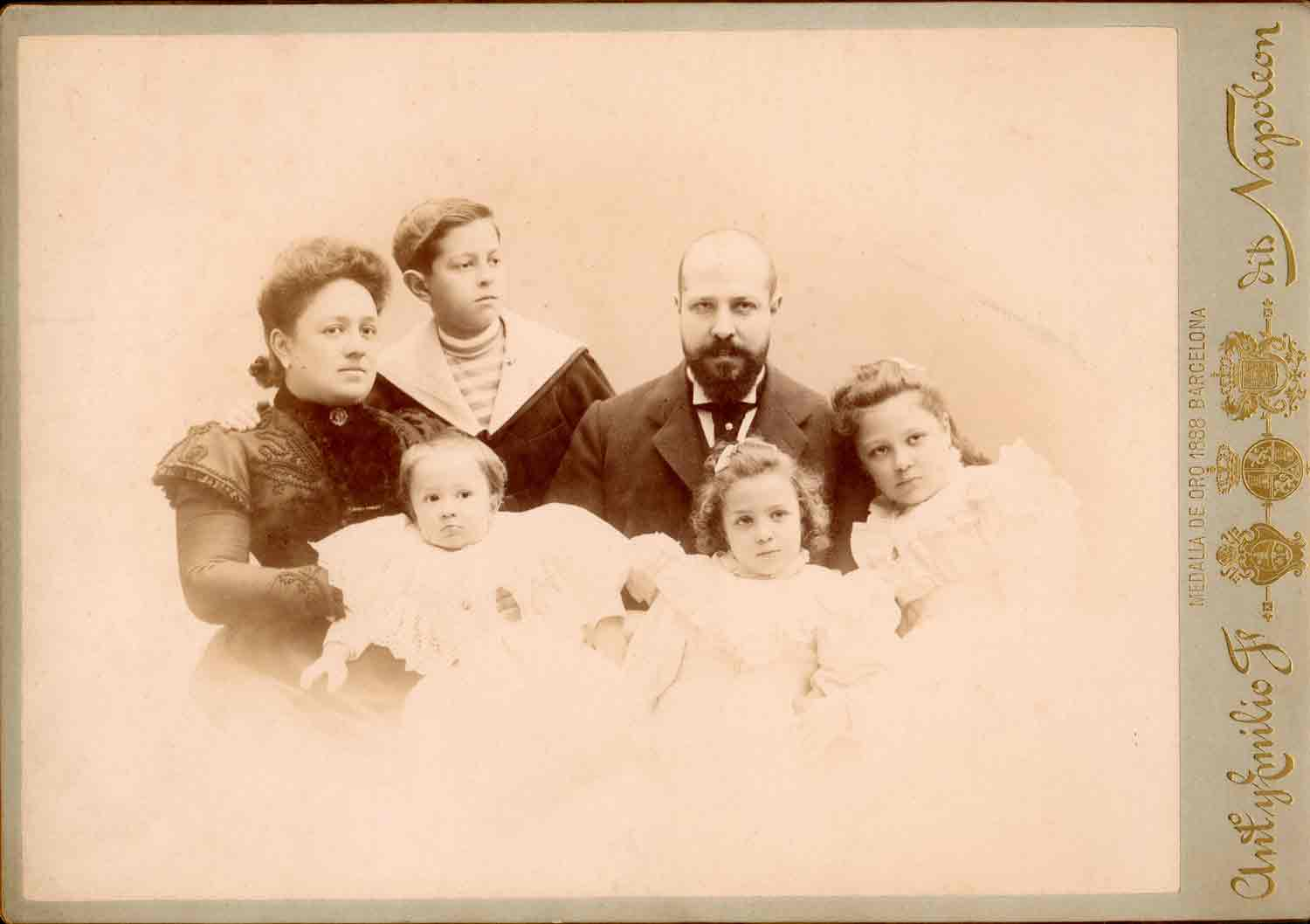 Familia de Josep Batlló i Amàlia Godó realitzada pels fotògrafs Napoleon